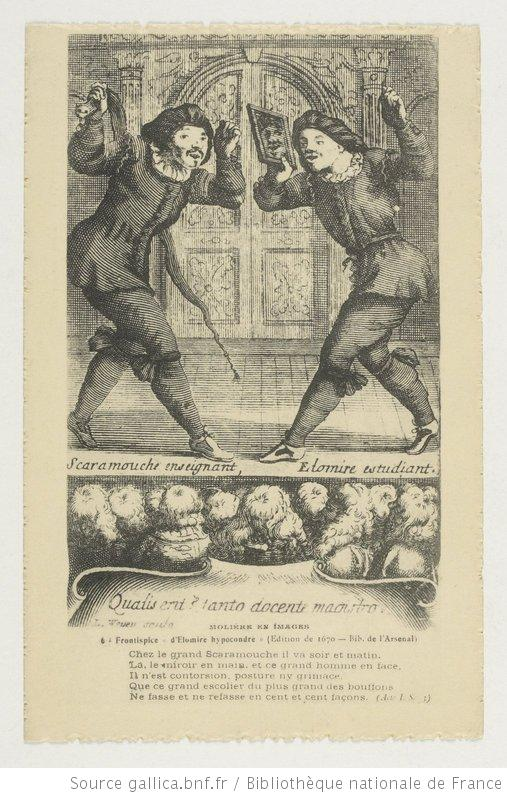 Le boulanger de Chalussay(allonym)